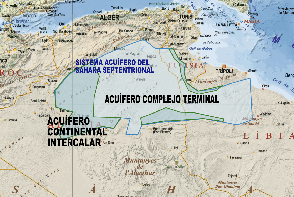 Acuífero Sahara a partir de Instamaps